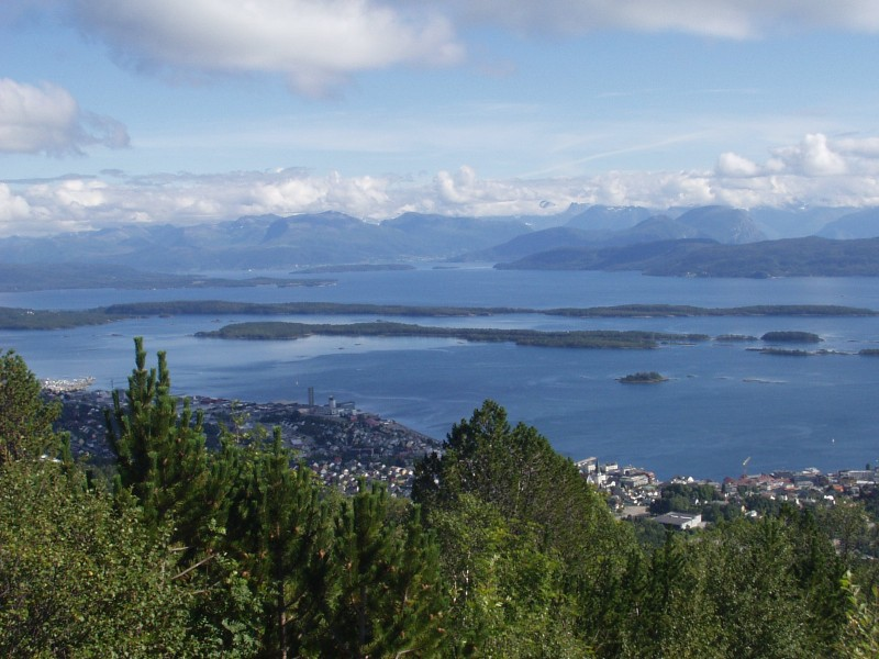 Description: Blick auf den Hafen von Molde Capture date: 2005-08-13 Photographer: sgm